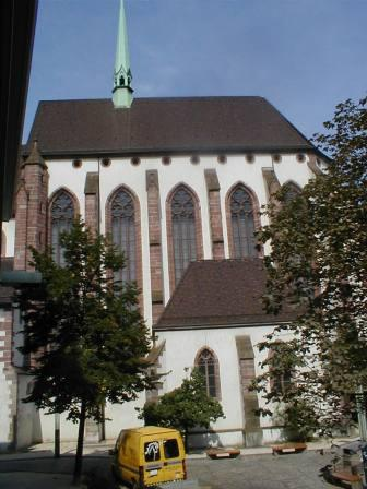 Barfüsserkirche